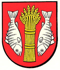 Wappen von Rorschach im Schweizer Kanton St. Gallen